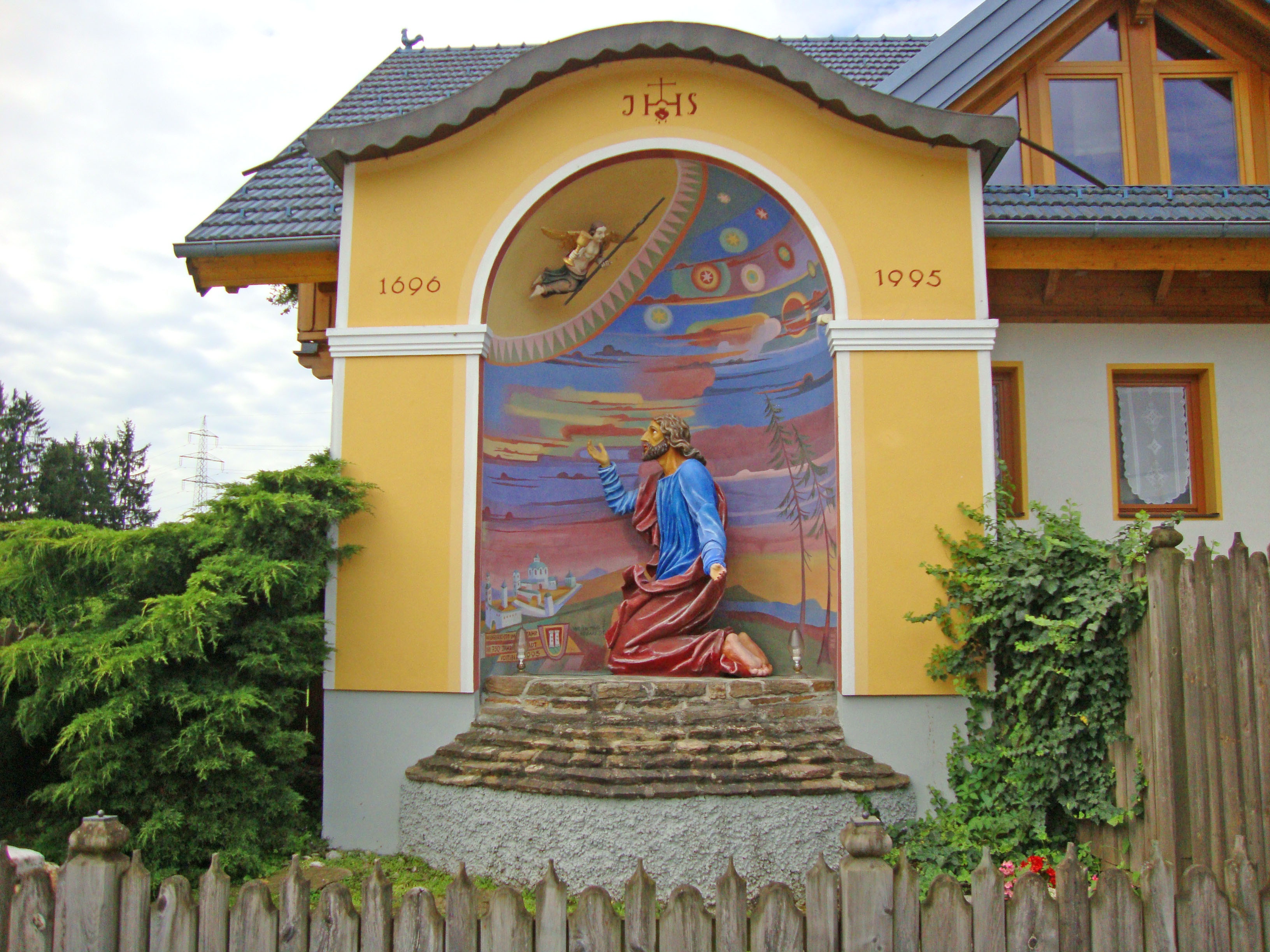 Oberjäger-Kapelle mit Steinfigur Christus am Ölberg